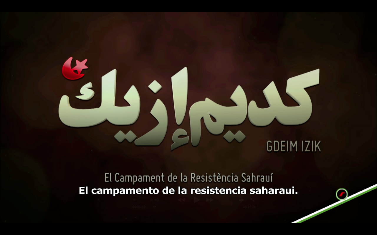 GDEIM IZIK-El campamento de la Resistencia Saharaui